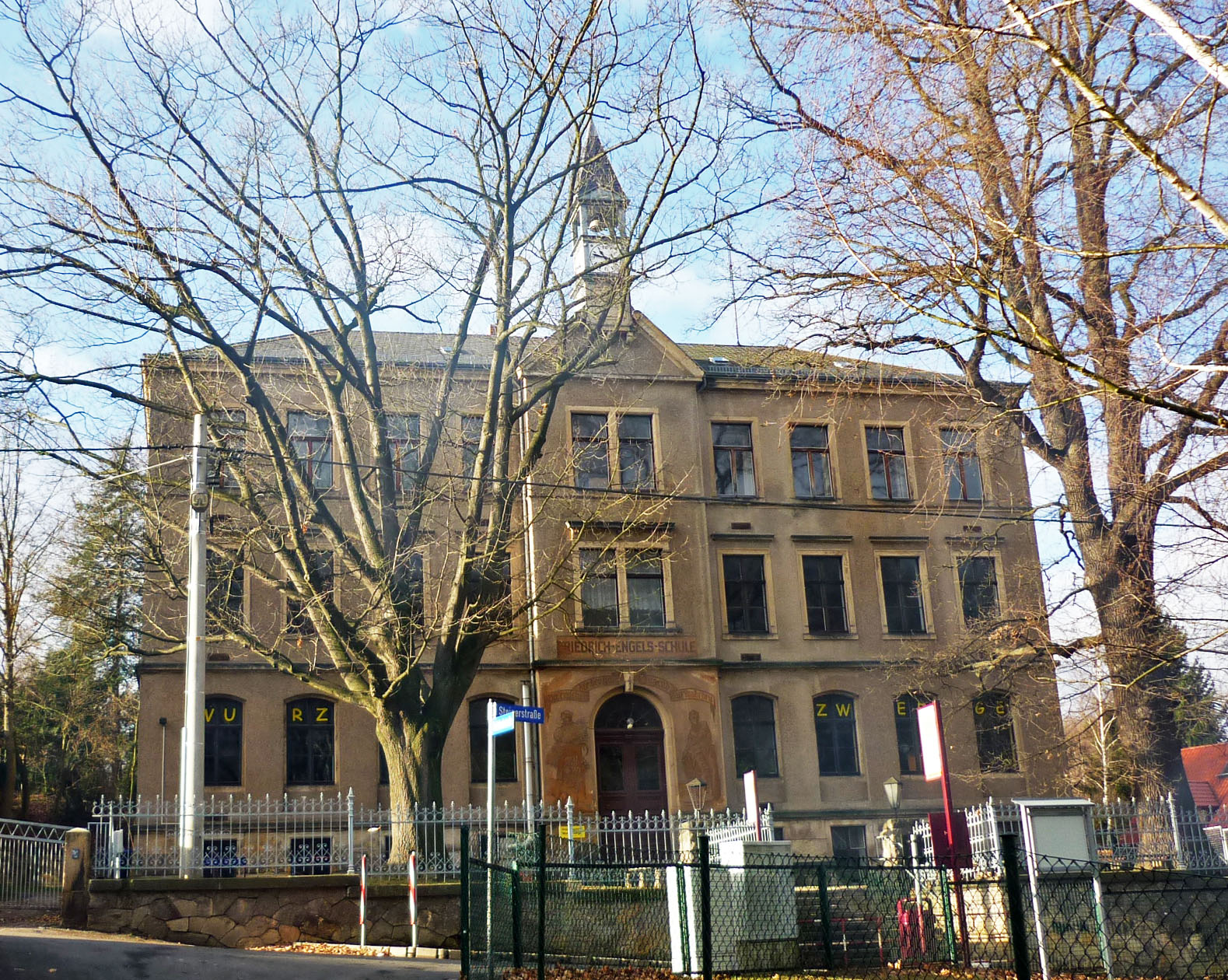 Schule (Steigerstraße) in Kleinnaundorf (Freital) in Sachsen